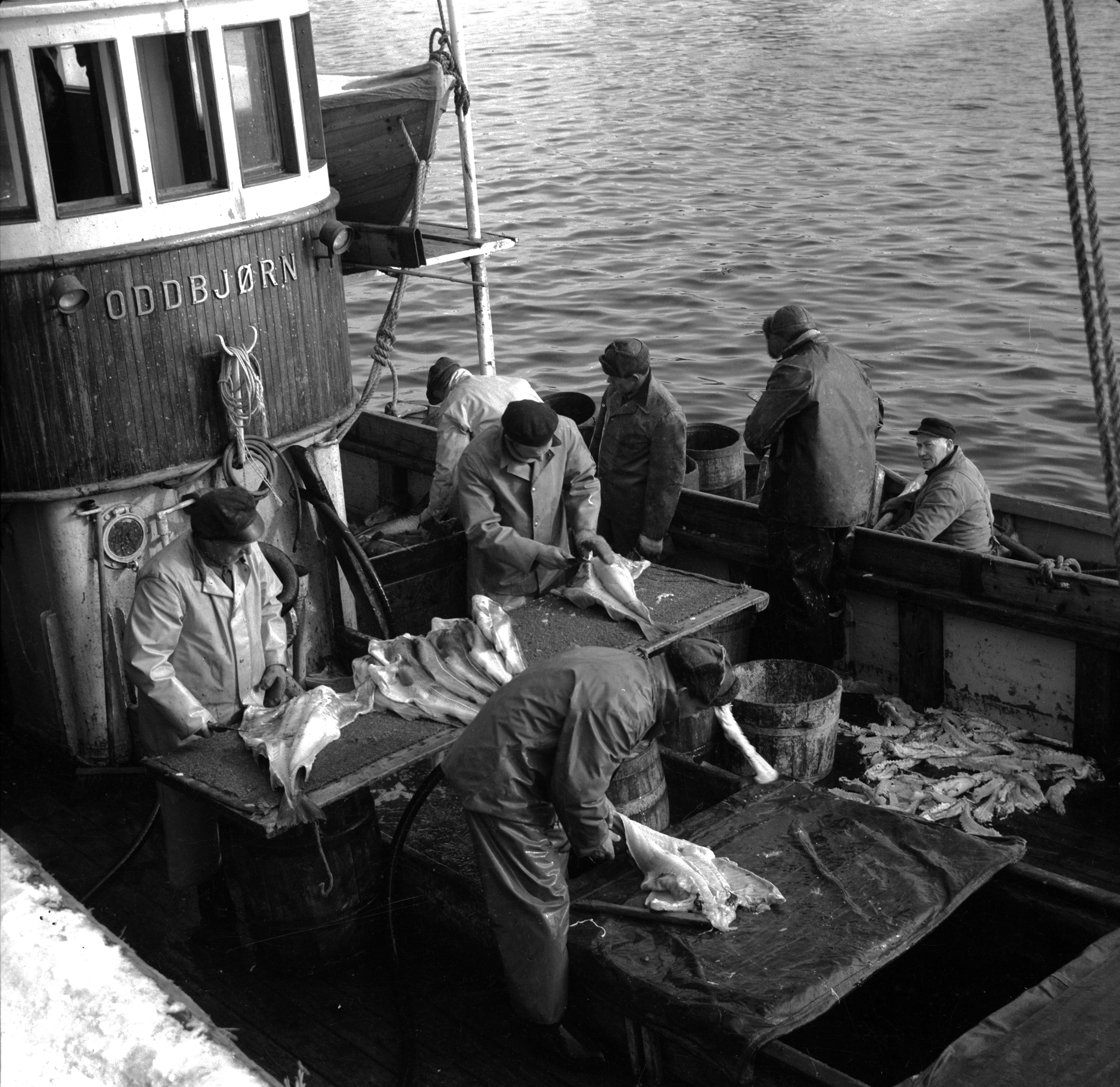 Bildet er hentet fra Nordlandsmuseet bildesamling etter Kanstad. Motivbeskrivelse: Farkosten "Oddbjørn", flekking av fisk Nøkkelord: Marine industrier Drakt, kropp Kar og beholdere Båter og fartøyer